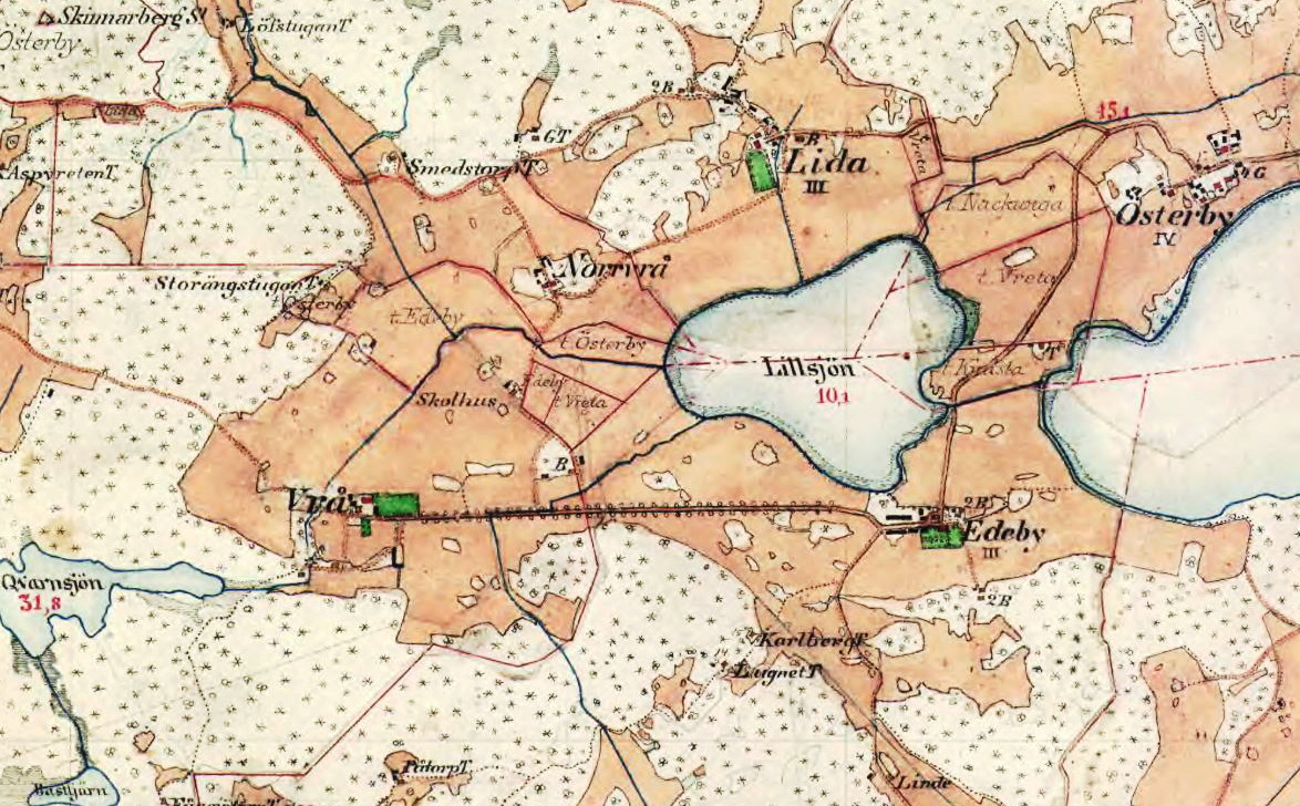 Gårdarna Lida, Edeby och Vrå på Häradsekonomiska kartan